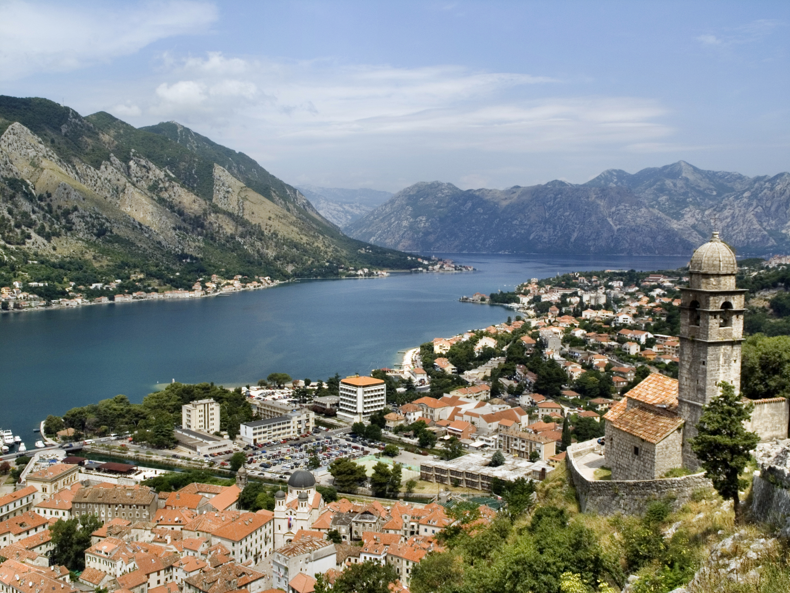 Черногория, Котор. Вид на Которский залив с крепостных стен. Справа - часовня Богородицы Здоровья